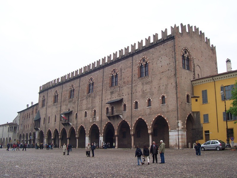 Mantova - Palazzo Ducale